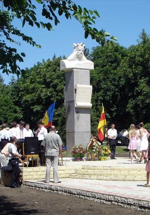 Памятник Штефана Великого в городе Бричаны